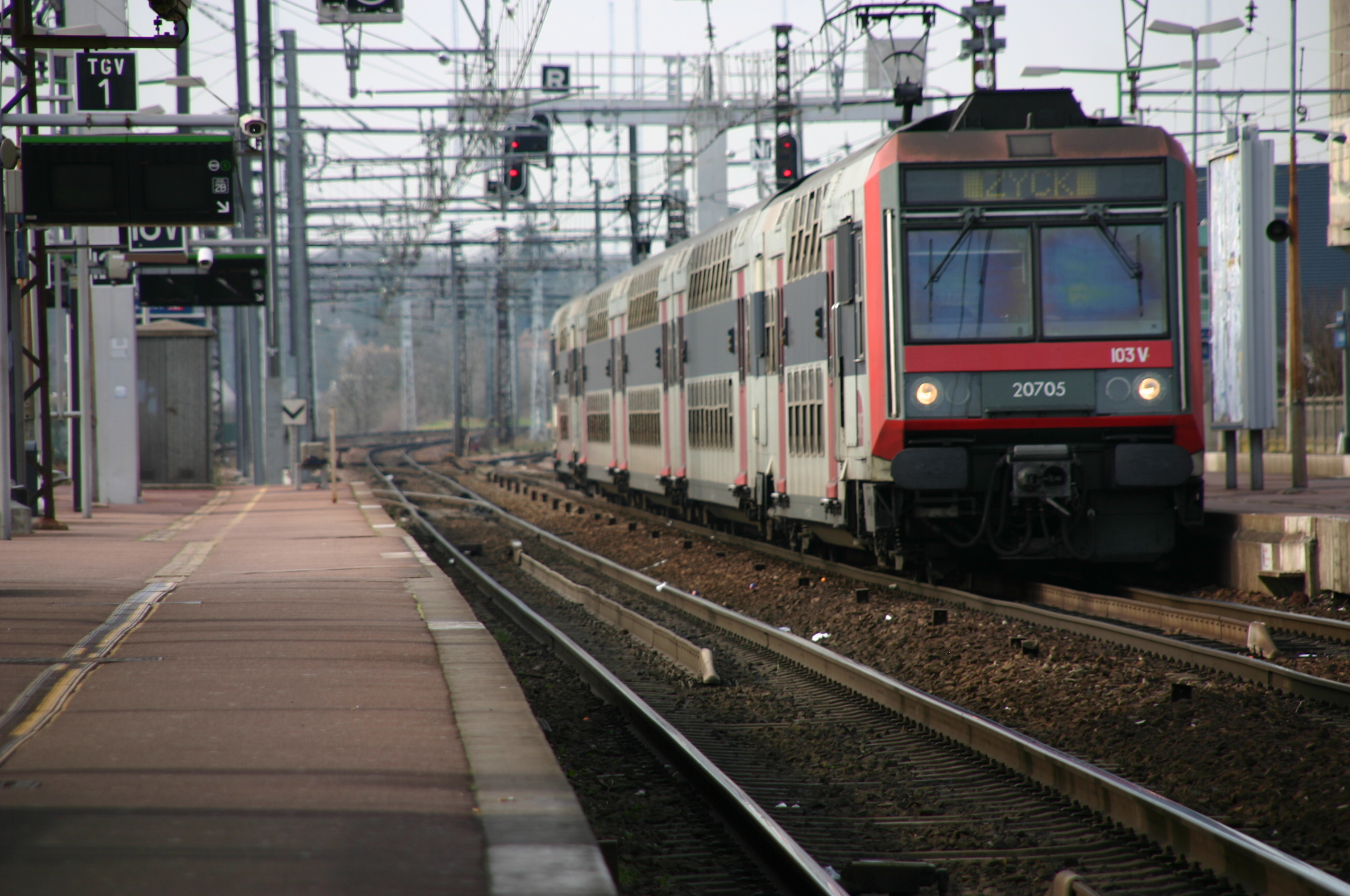 La gare de Melun, Melun, département de la Seine-et-Marne (France)